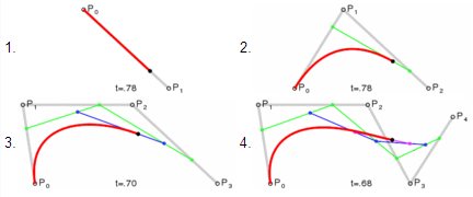 Four examples of Bézier curves. 1. linear; 2. quadratic; 3. cubic; 4. quartic.